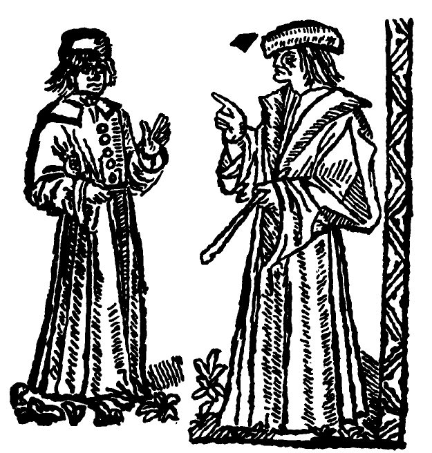 Illustration de la farce des deux savetiers (issue de la réimpression de 1838 en fac-simile de la plus vieille édition connue)